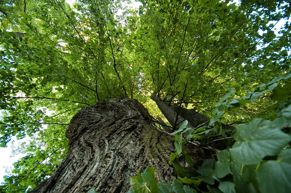 Koruna jedné z lip u kostela v Hojsově Stráži